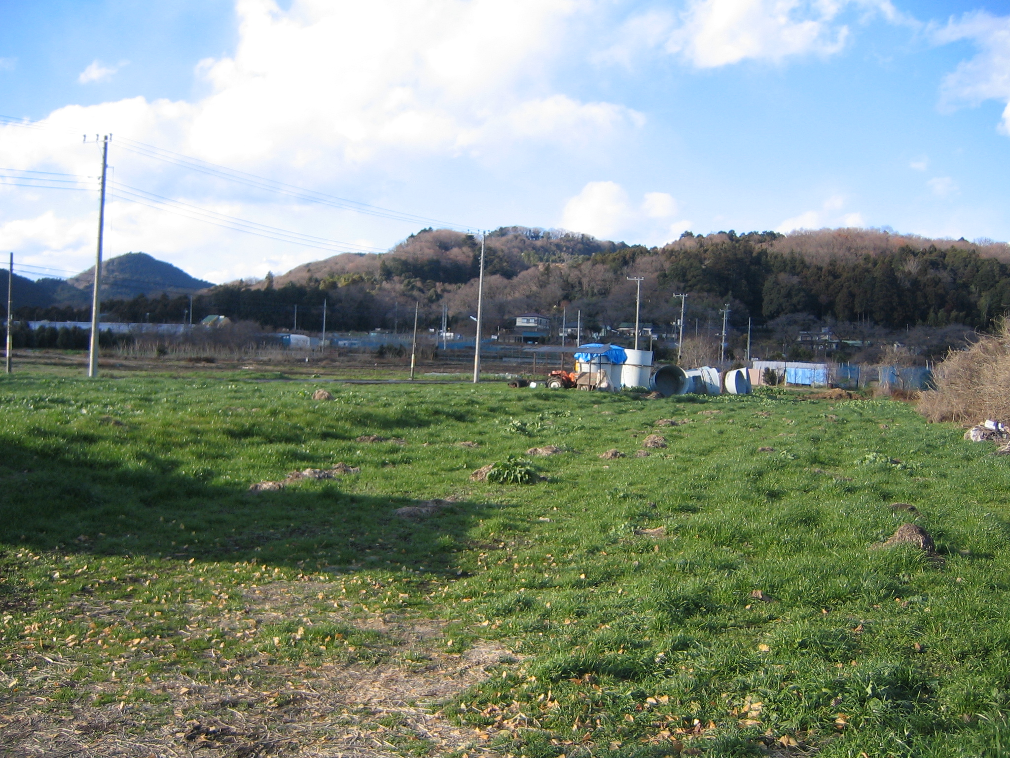 三増古戦場